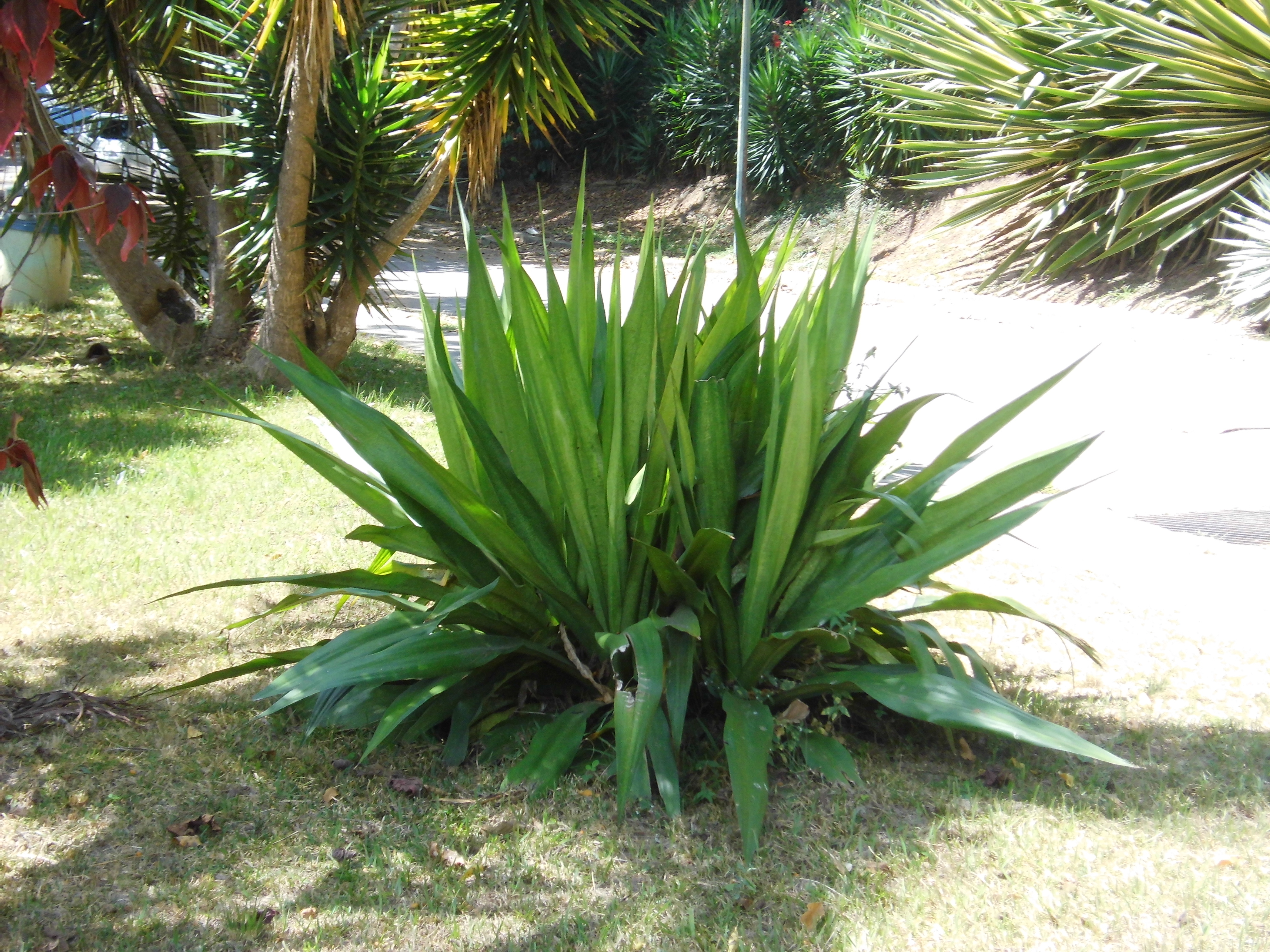 Agave salmiana Otto localizadas en la Boyera, estado Miranda - Venezuela